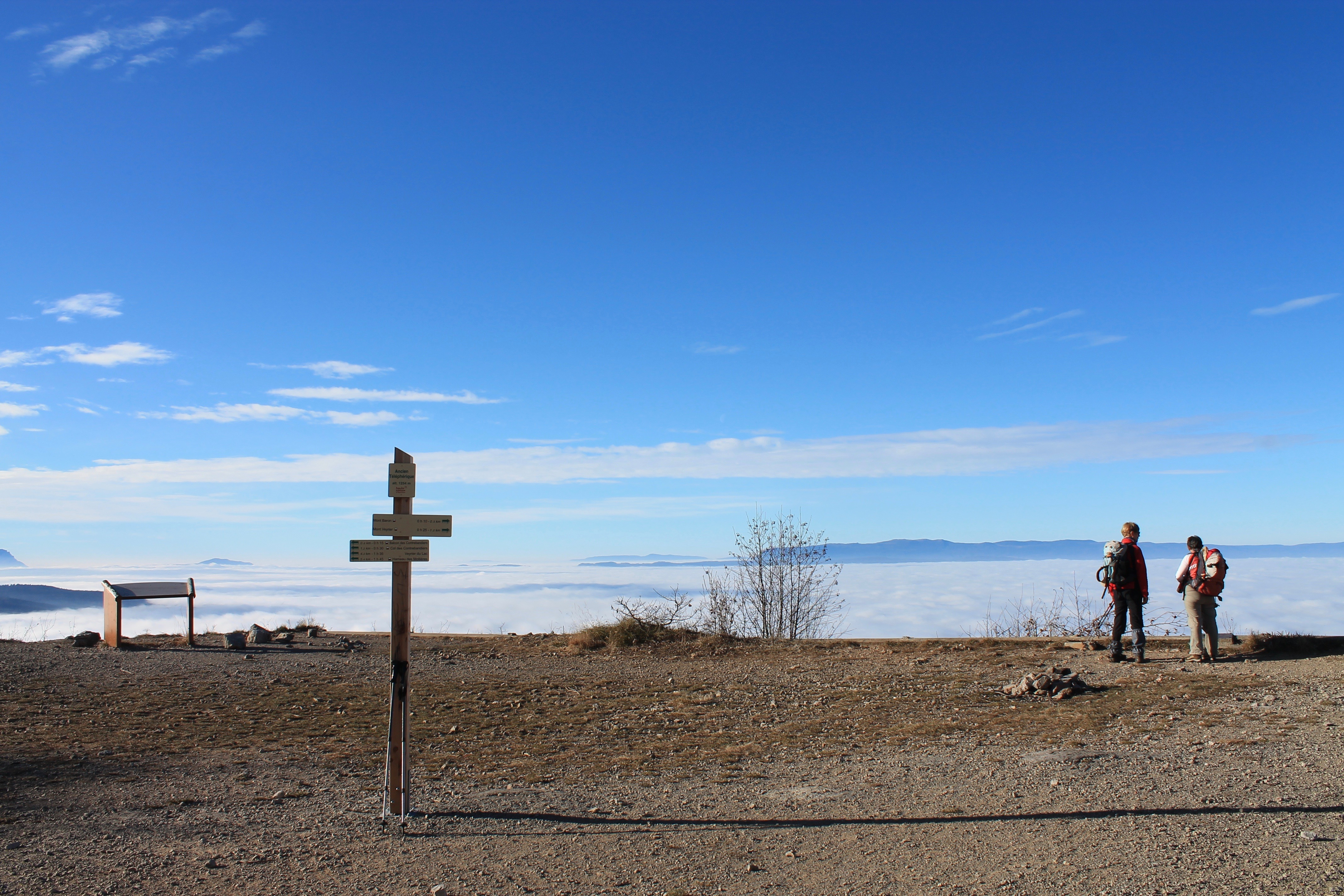 Balcon des Contrebandiers (2016)